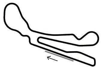 Skizze Rennstrecke Guadix